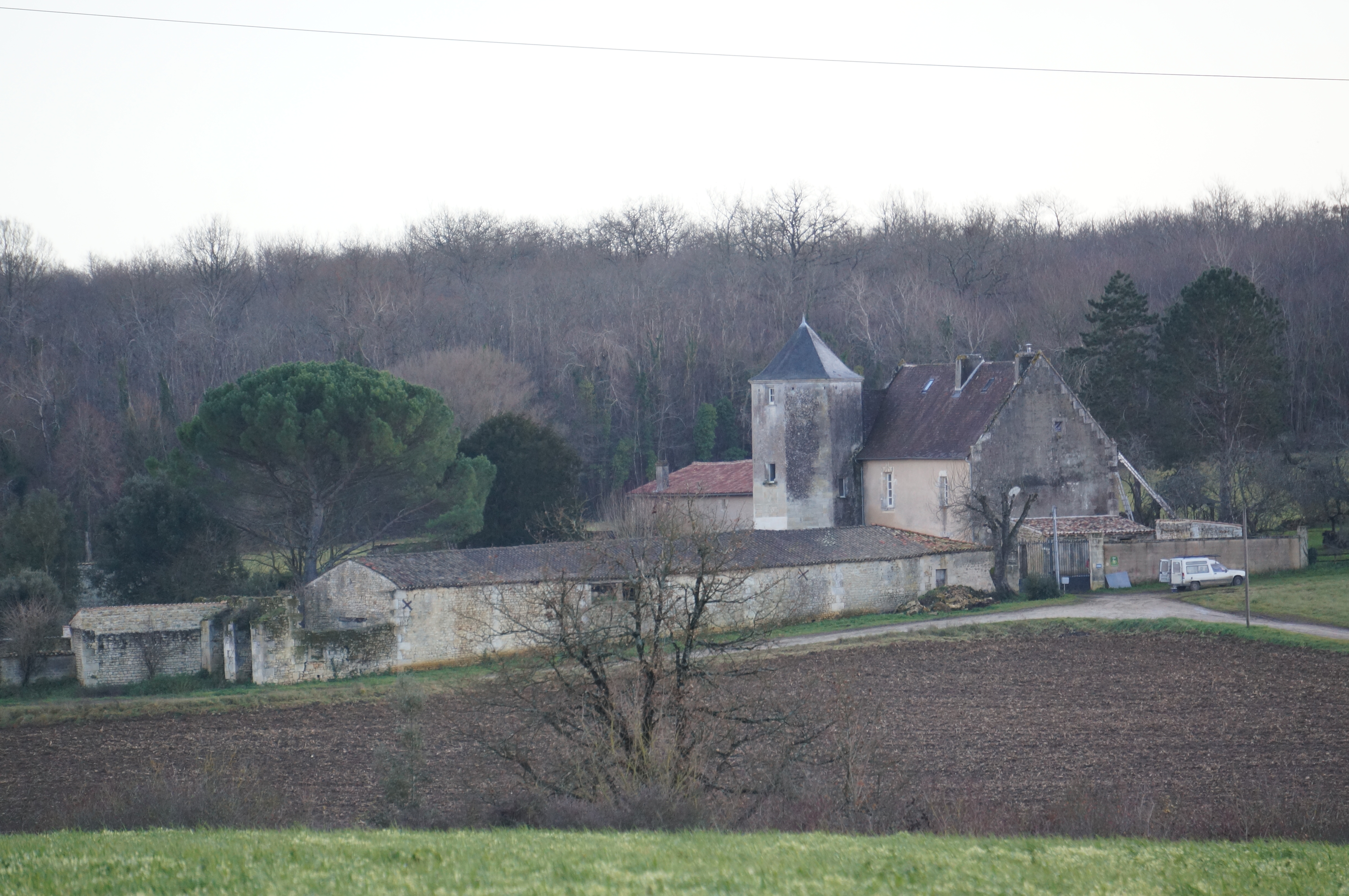 Château de Pernan (XVIIe siècle), en la commune d'Avy.